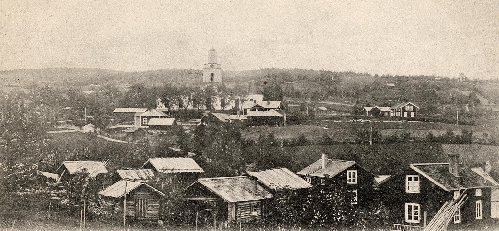 Bjursås Church and Västanberg, Dalarna, Sweden